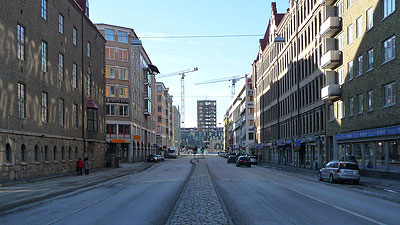 Odinsgatan, Göteborg, 12 februari 2011